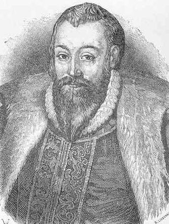 Svante Sture d.y. Avbildning i "Sveriges historia III", skriven av Oskar Alin, tryckt i Stockholm 1889, sidan 281.